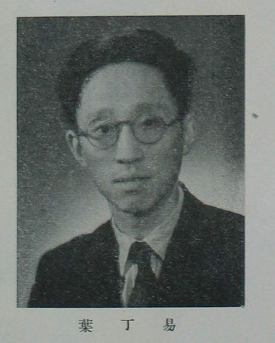 中國人民政治協商會議第一屆全體會議代表